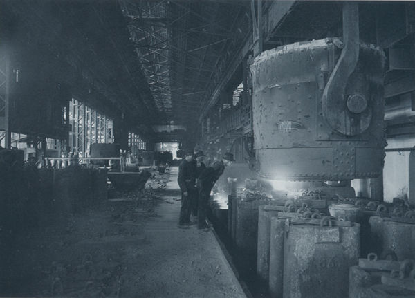 Colata in lingottiera presso lo stabilimento Unione della Falck (1930)